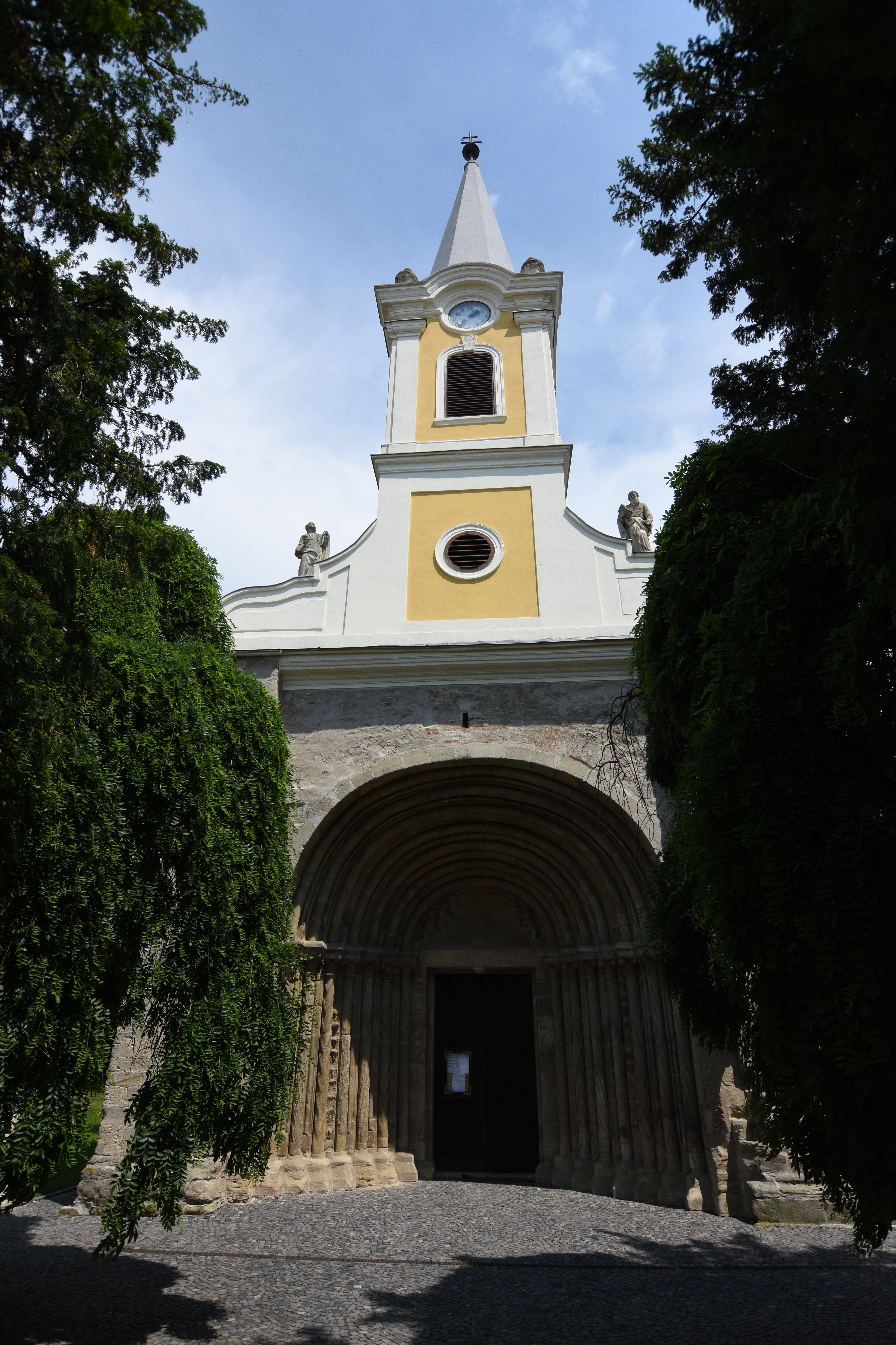 Saints Peter and Paul church in Sopronhorpács